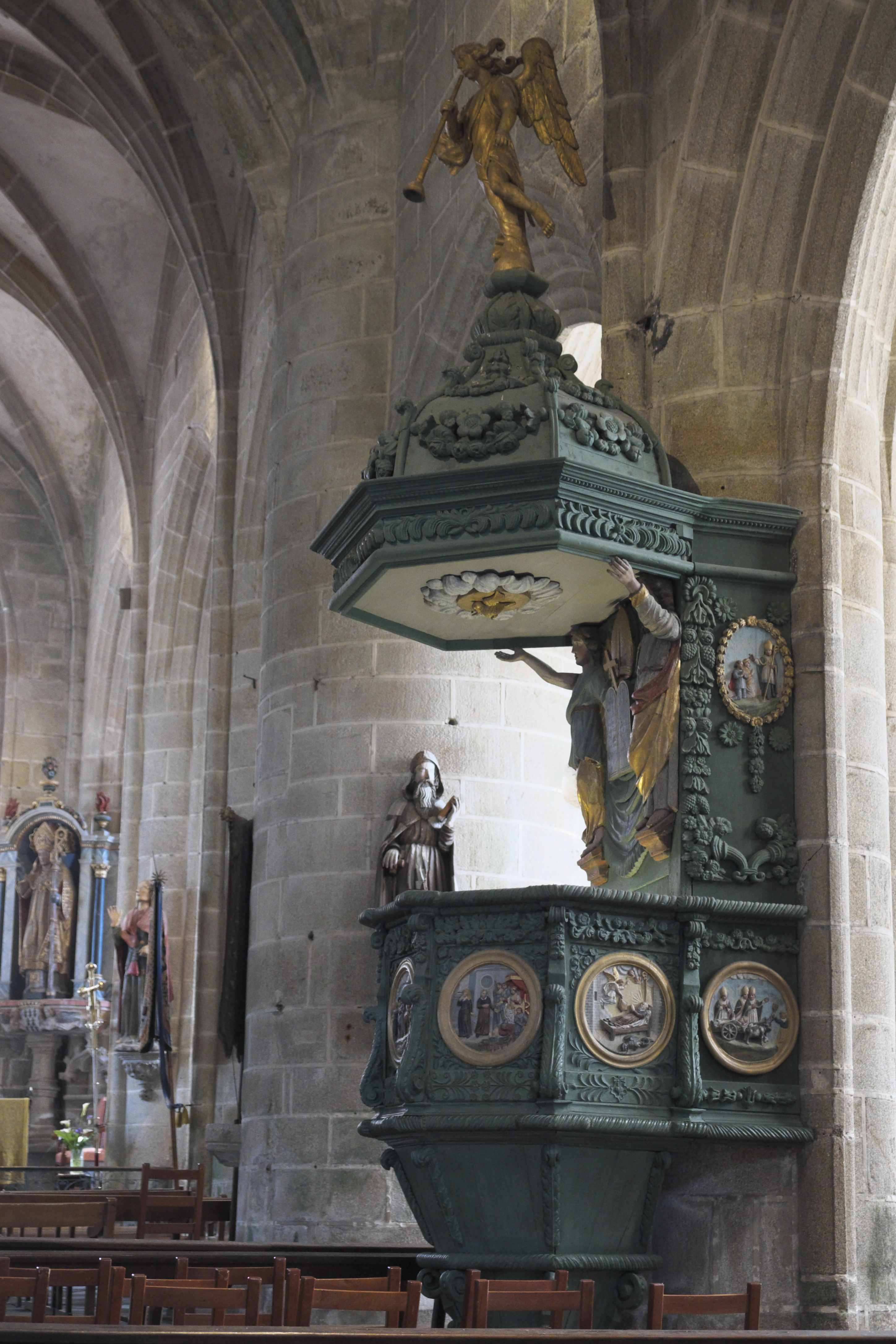 Katholische Kirche Saint-Ronan in Locronan im Département Finistère (Region Bretagne/Frankreich), Kanzel